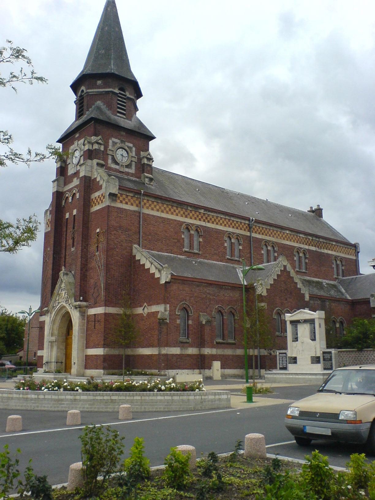 Haisnes, Pas de Calais, France: l'église Saint-Nicaise.